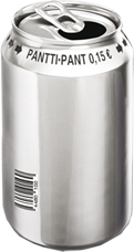 Tölkki